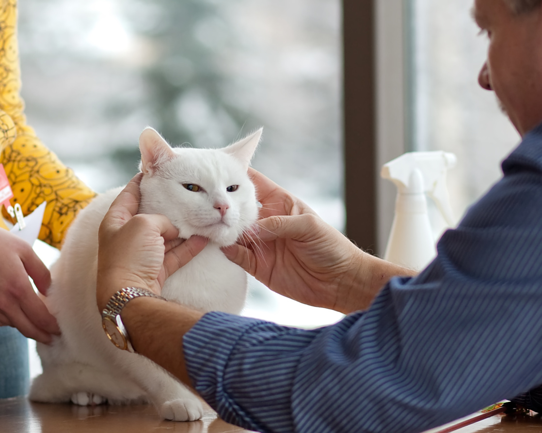 European shorthair à l'exposition féline de Kuopio. GIC Paavo [EUR w 62] male EX1 CACIB